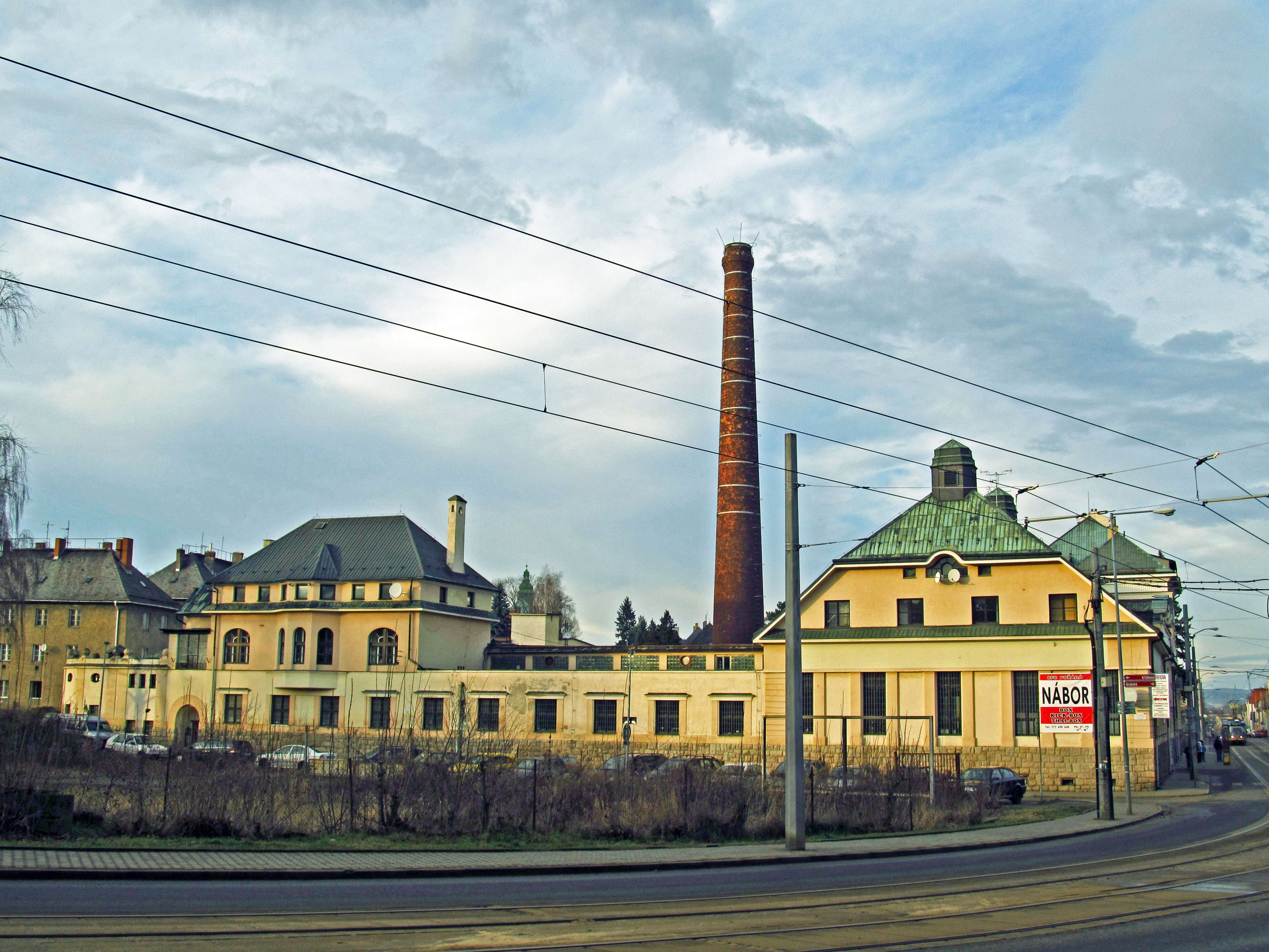 Pekárna (Liberec), Hanychovská 622/1, Liberec